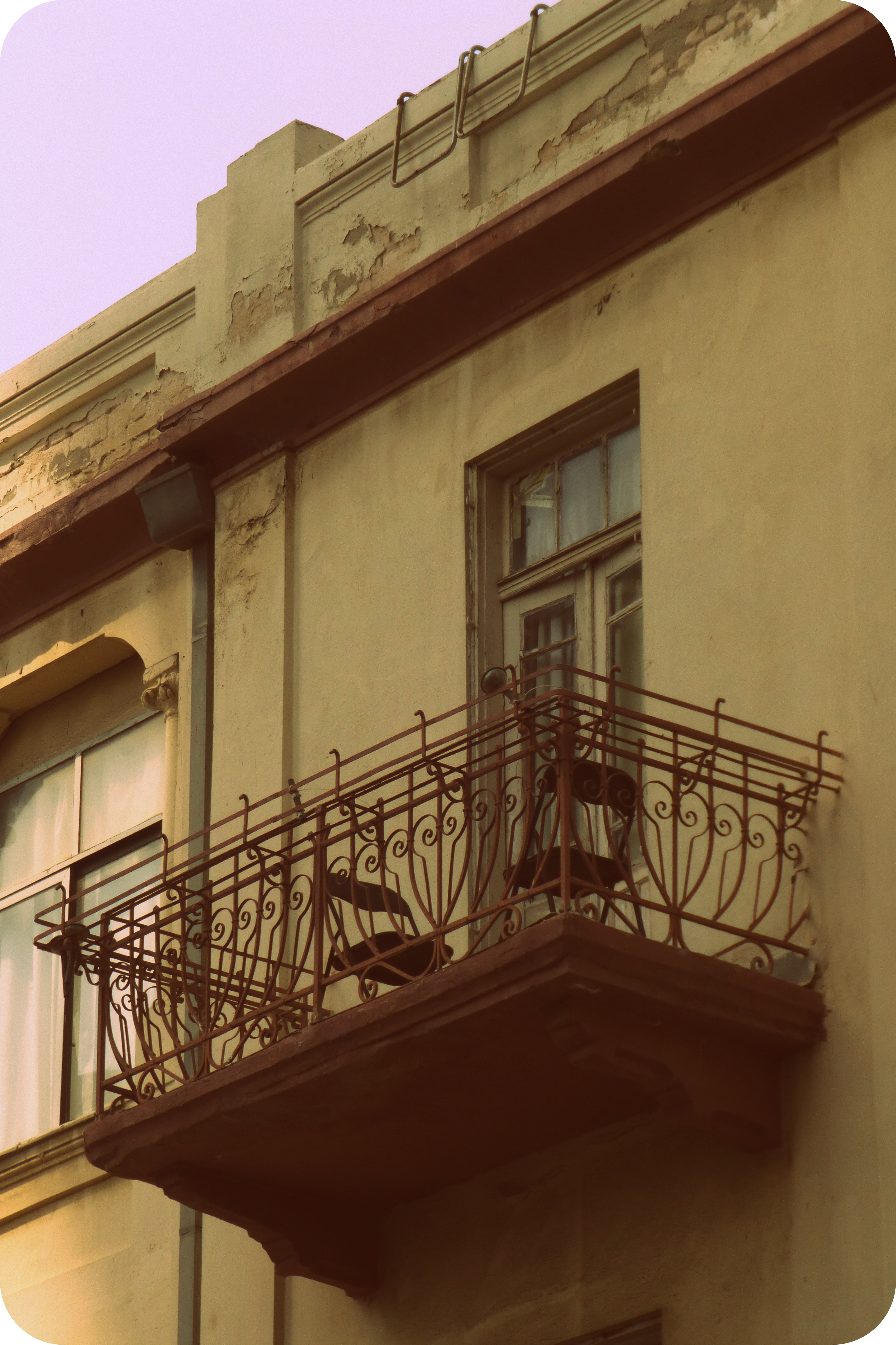 בית בשדרות רוטשילד פינת אלנבי בתל אביב. תוכנן על ידי האדריכל יוסף ברלין בשנת 1922. הסגנון העיצובי אקלקטי. המעקות מעוצבים כחנוכייה, ואת החלונות מעטרים עמודים קורינתיים. על החזיתות משובצים אריחי קרמיקה צבעוניים האריחים מציגים נופים מארץ ישראל וסיפורים מן התנ"ך. בחזית הפונה לאלנבי – ציור העיר ירושלים, וכן ציון שם בעלי הבית.